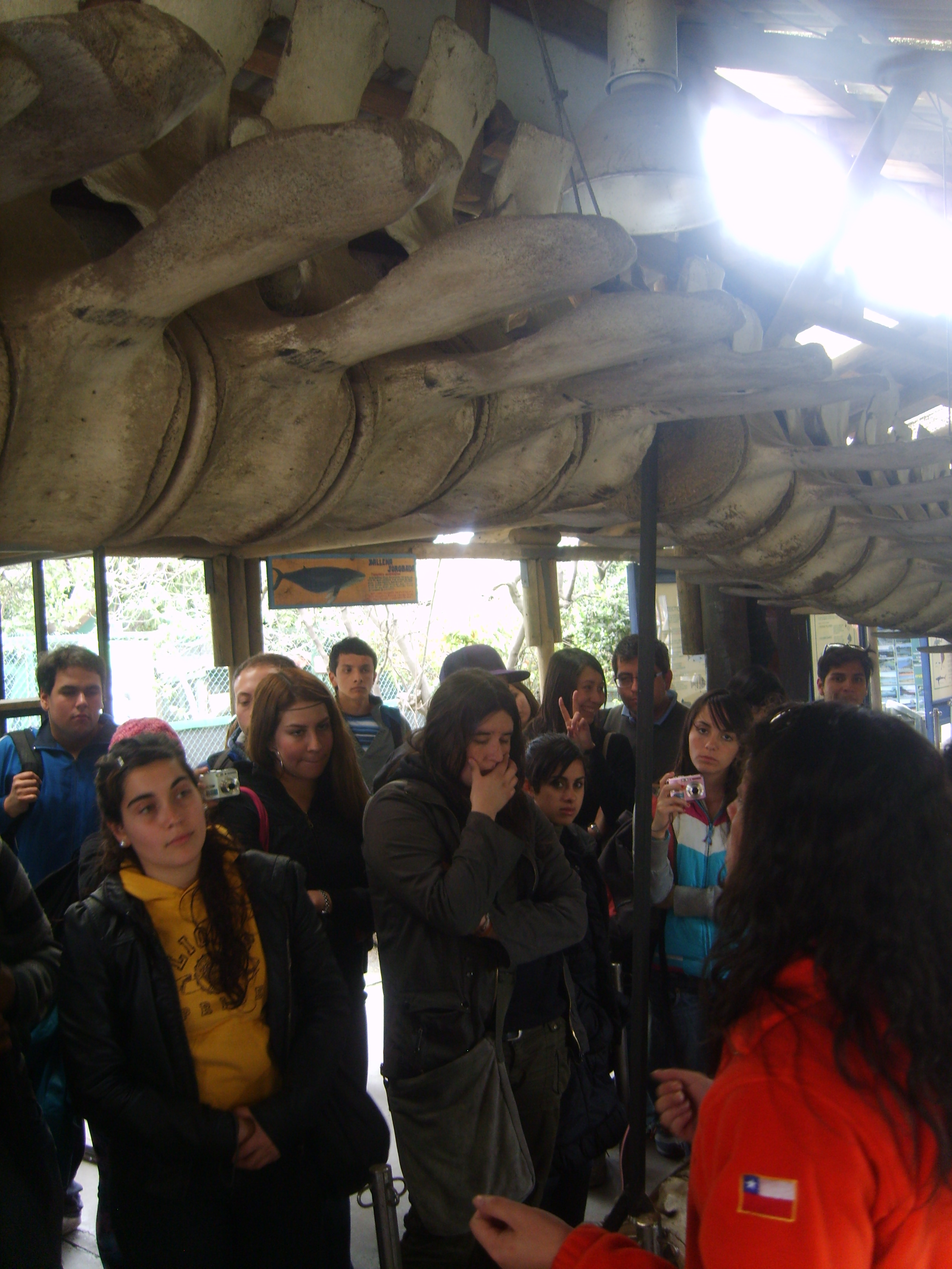 Una charla a estudiantes universiarios en el Museo Municipal de Ciencias Naturales y Arqueología de San Antonio